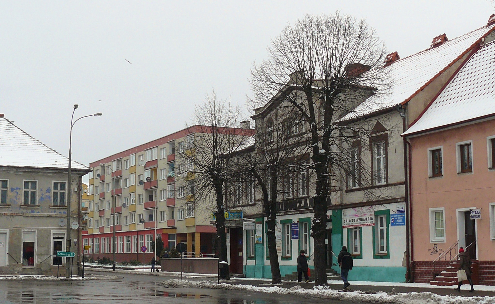 Rynek w Myśliborzu.